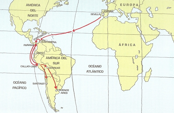 Monopolio comercial del virreinato del Peru